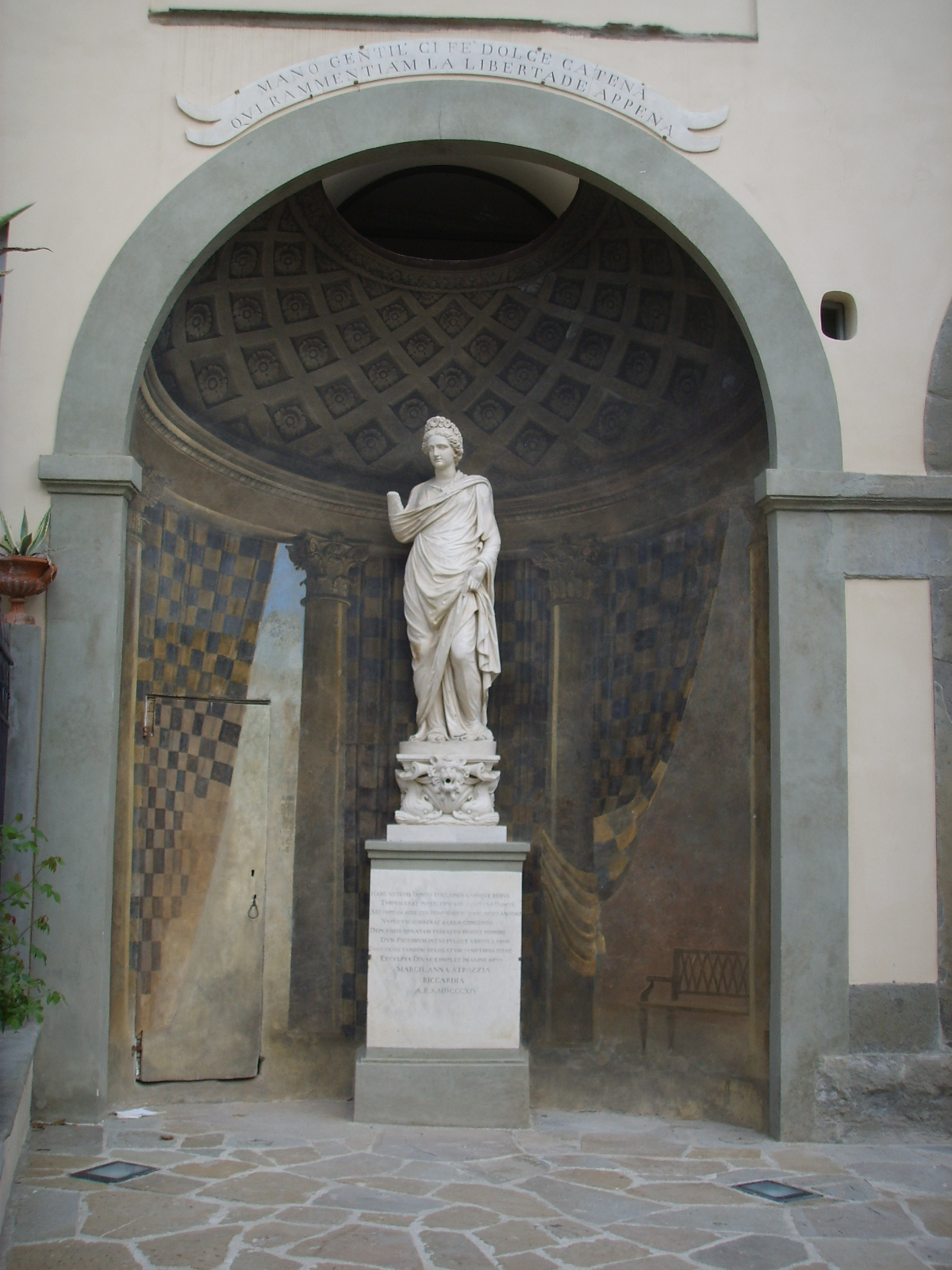 Palazzo sacrati, cortile 07 nicchia